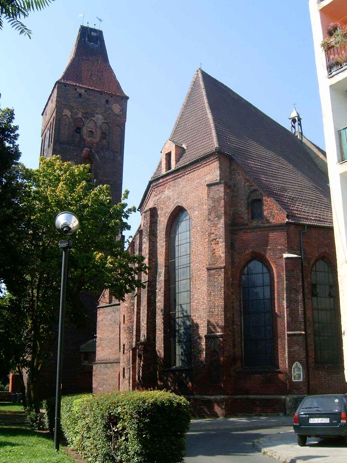 Lubin - kościół parafialny p.w. Matki Boskiej Częstochowskiej